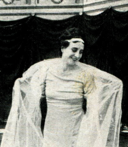 L'attrice Mary Cleo Tarlarini in "Spergiura" (1909)